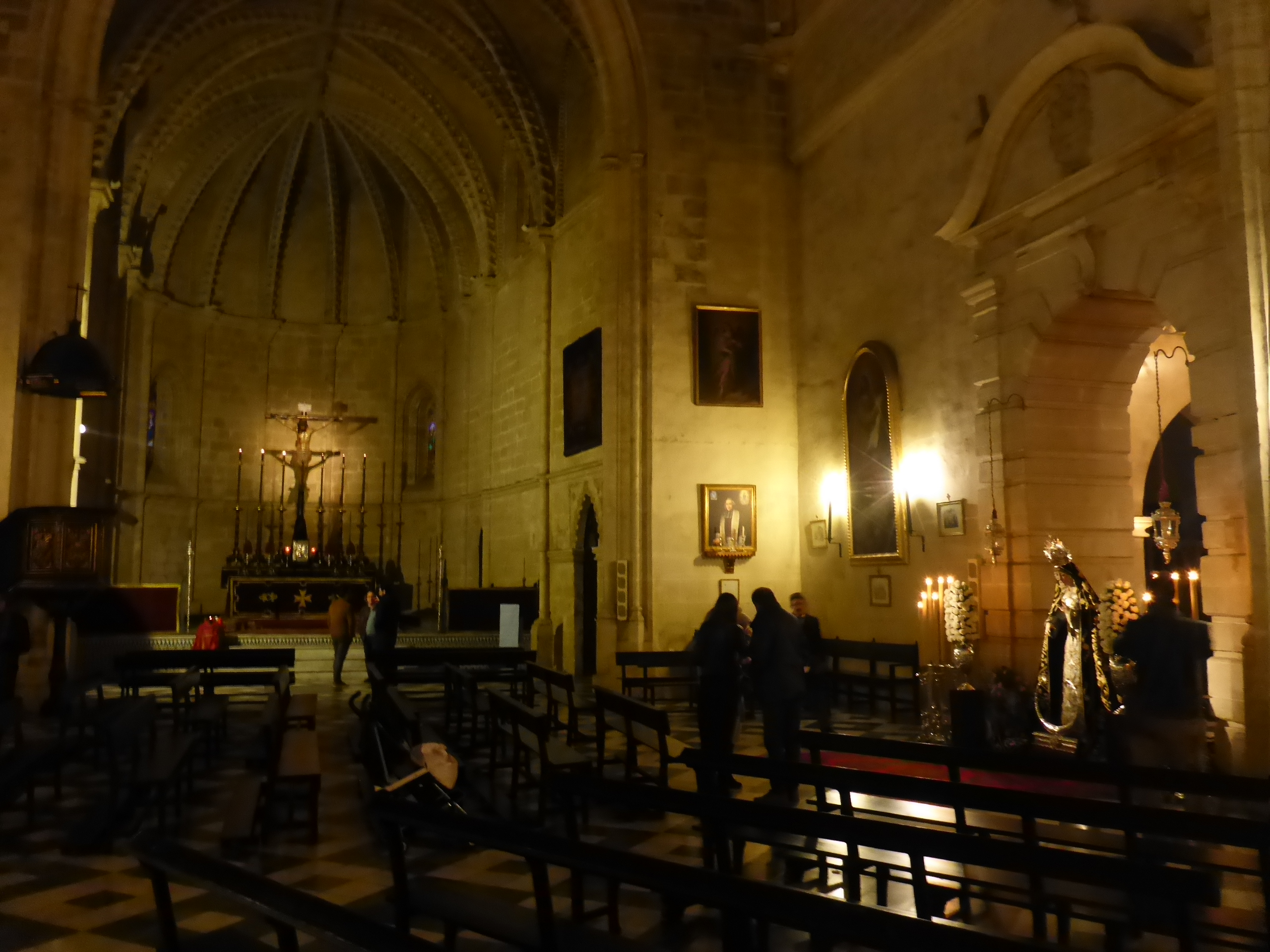 Interior de la Iglesia Church of San Juan de los Caballeros, Jerez de la Frontera (España)